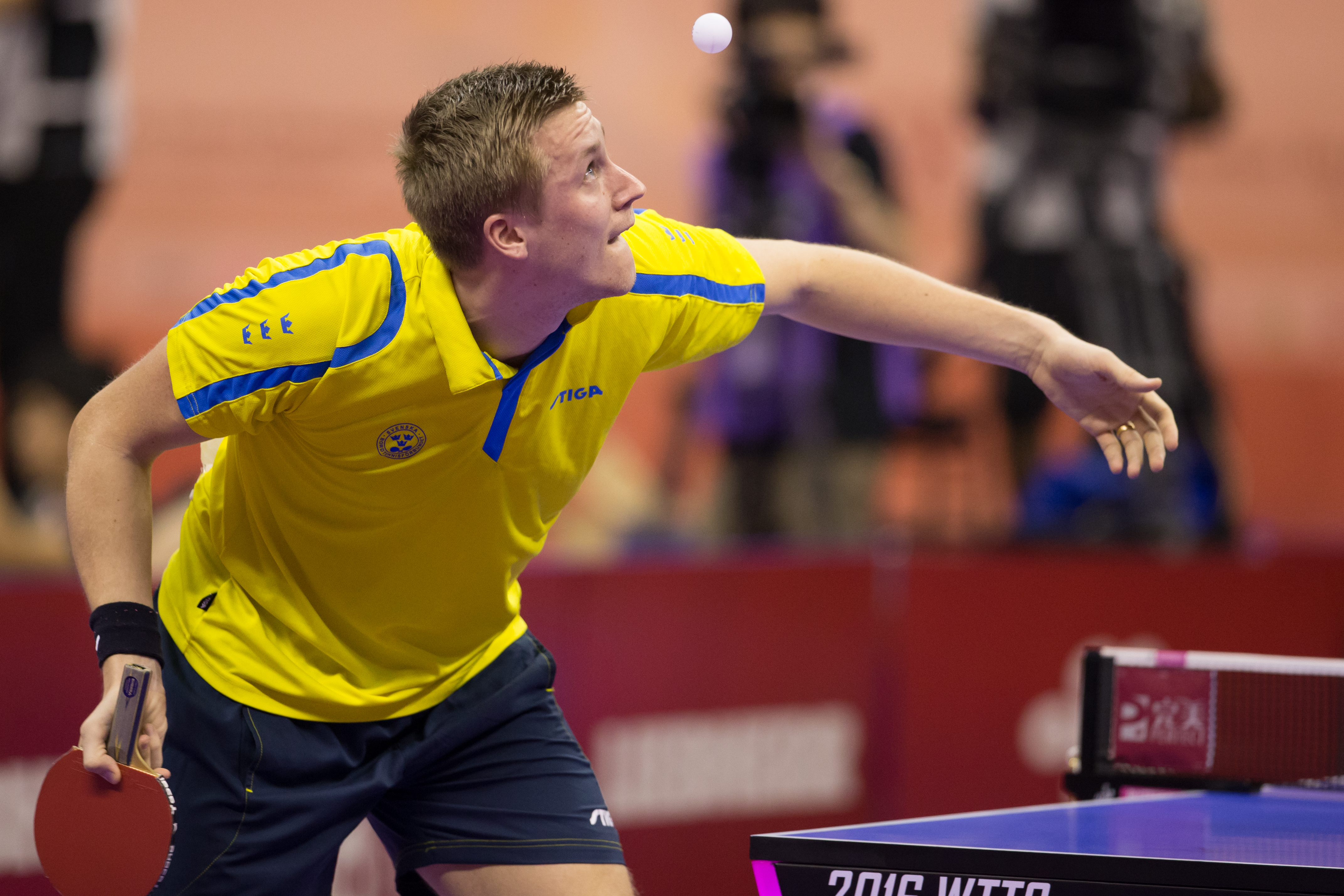 _K0K3758